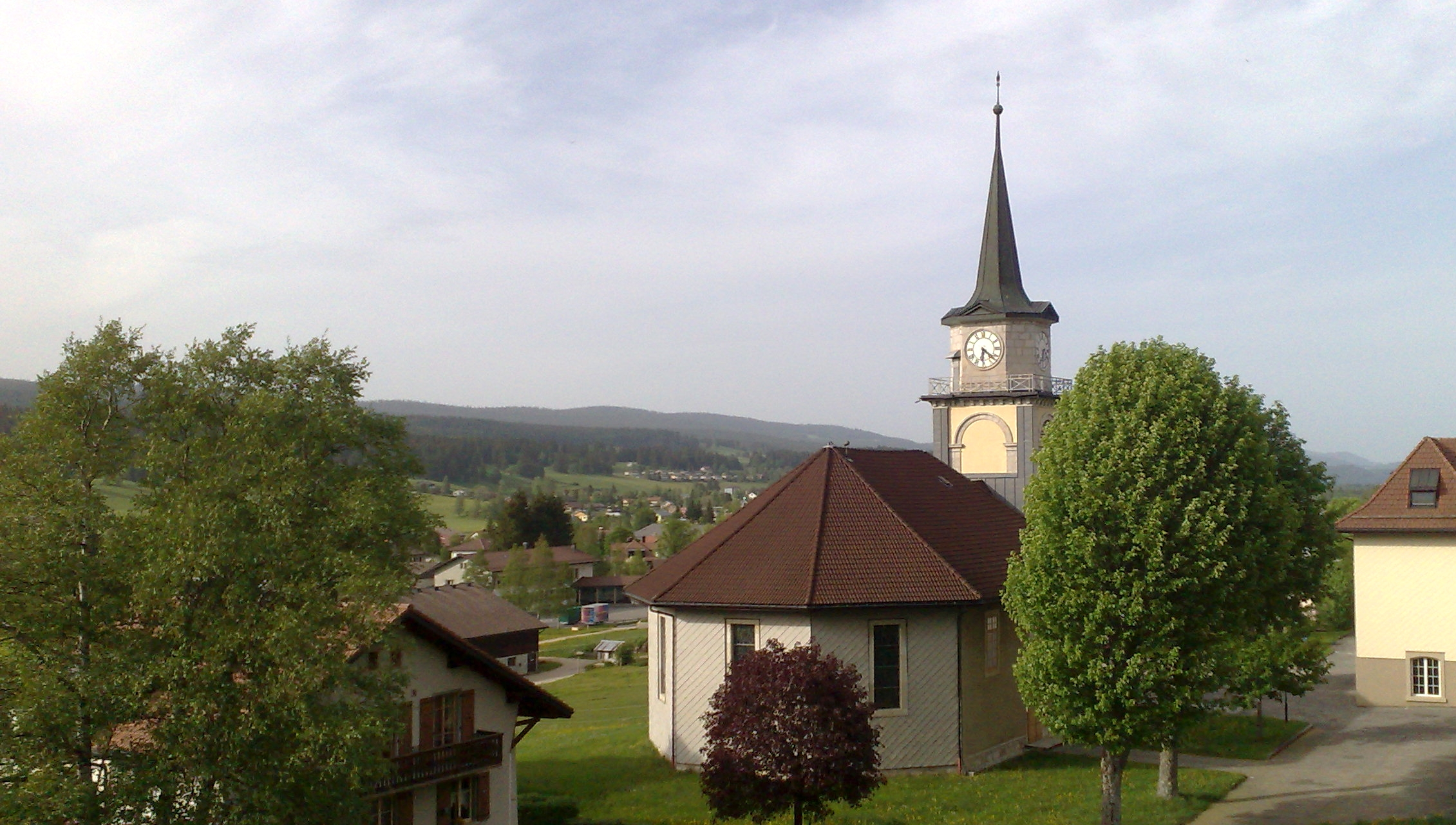 Le temple protestant à Le Brassus dans la vallée de Joux en Suisse.